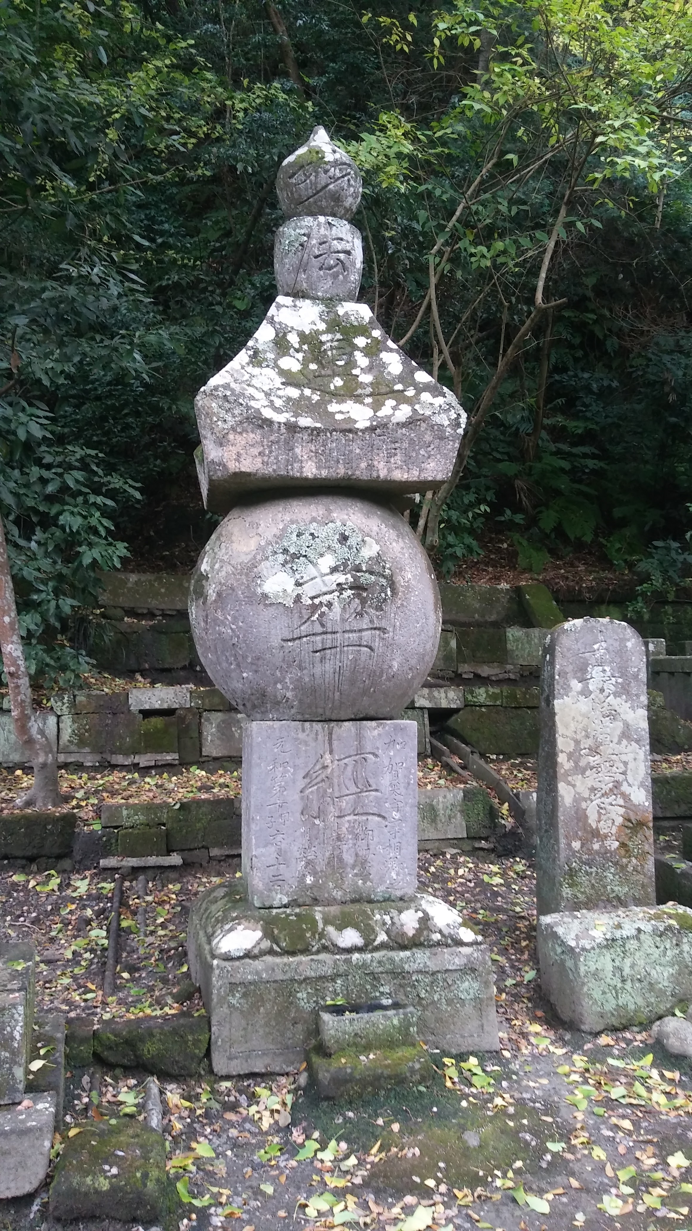 妙本寺（鎌倉）境内にある、前田利家側室・寿福院の逆修塔（生前供養塔）。